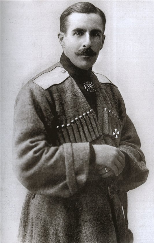 Генерал-лейтенант Половцов Петр Александрович (1874-1964)